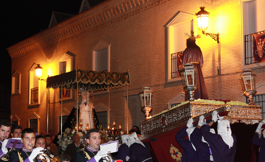 Encuentro entre Jesús Nazareno de Medinaceli y La Dolorosa, en Santa Olalla (Toledo)